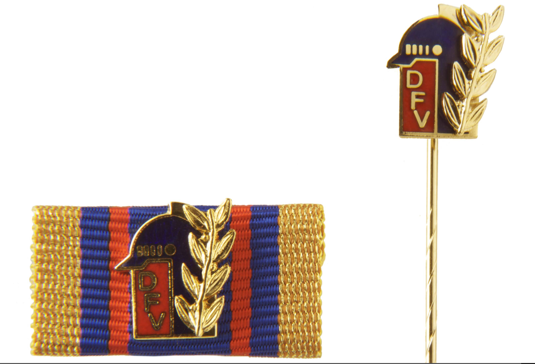 Ehren- und Abzeichen , Orden und Ehrenzeichen/ Feuerwehr